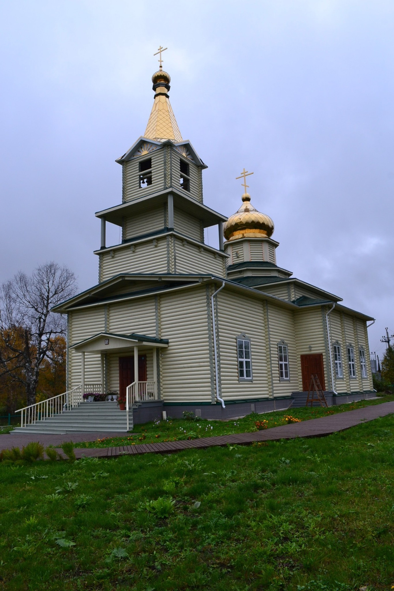 Никольская церковь